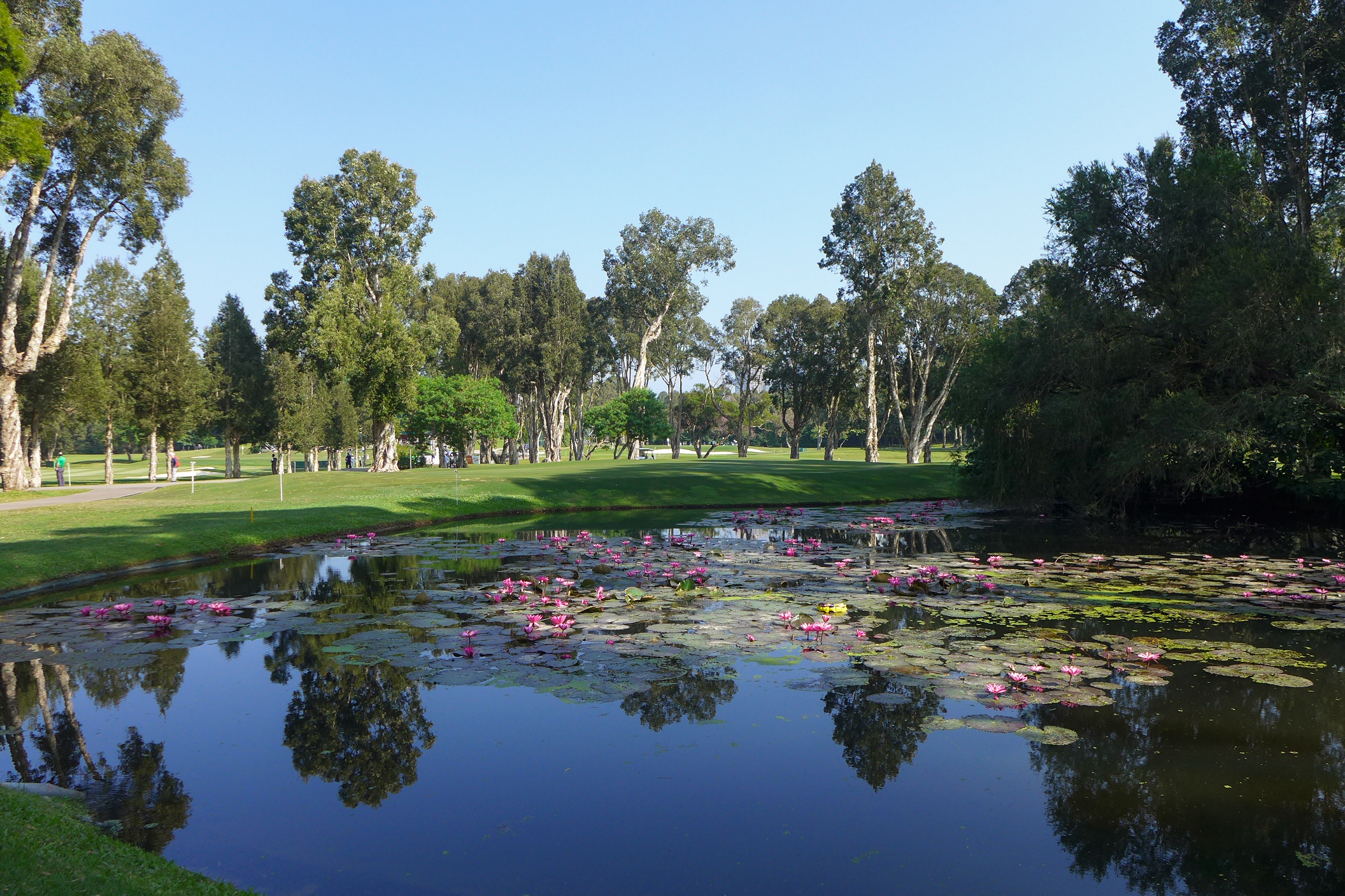 Hong Kong Golf Club Fanling Pond